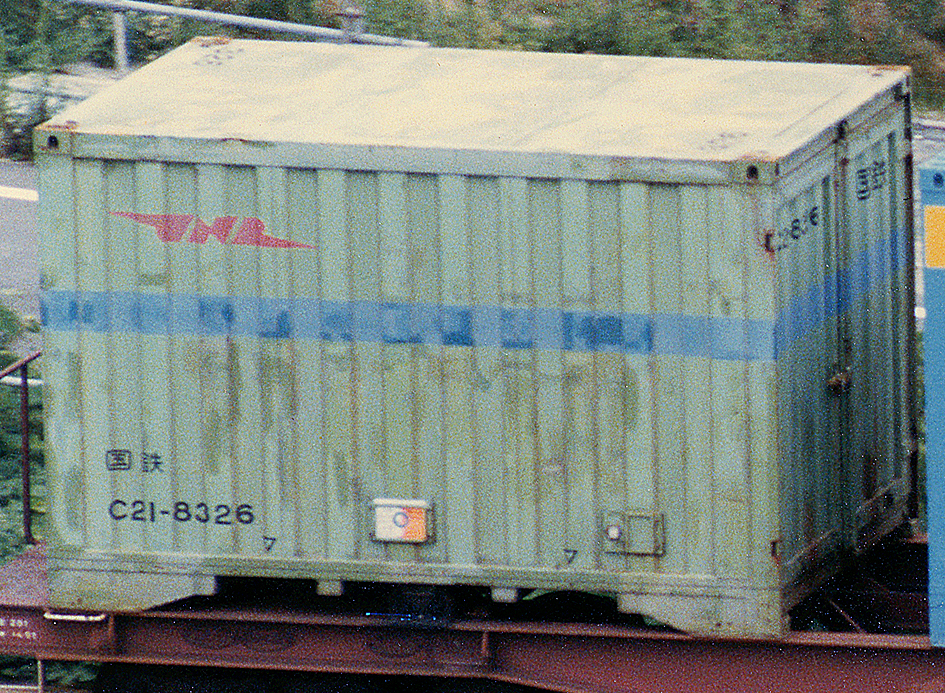 JR貨物 C21-8326